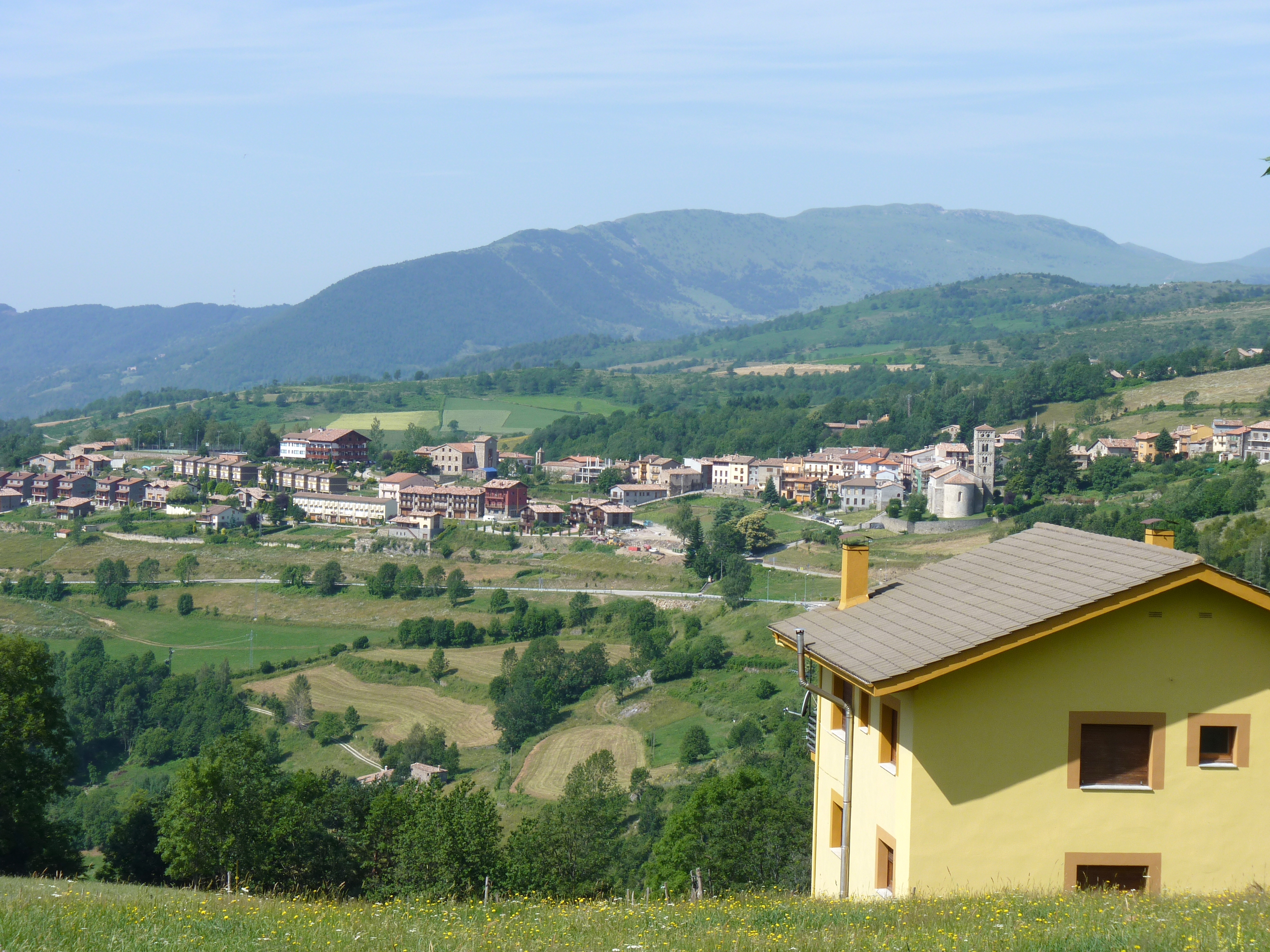 Poble fotografiat des de l'estació de servei, Molló (Ripollès, Girona, Catalunya, Espanya)